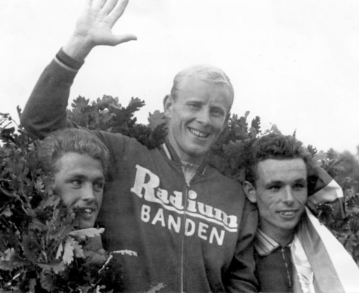 René Lotz als winnaar op het posium van de ronde van Oostenrijk.